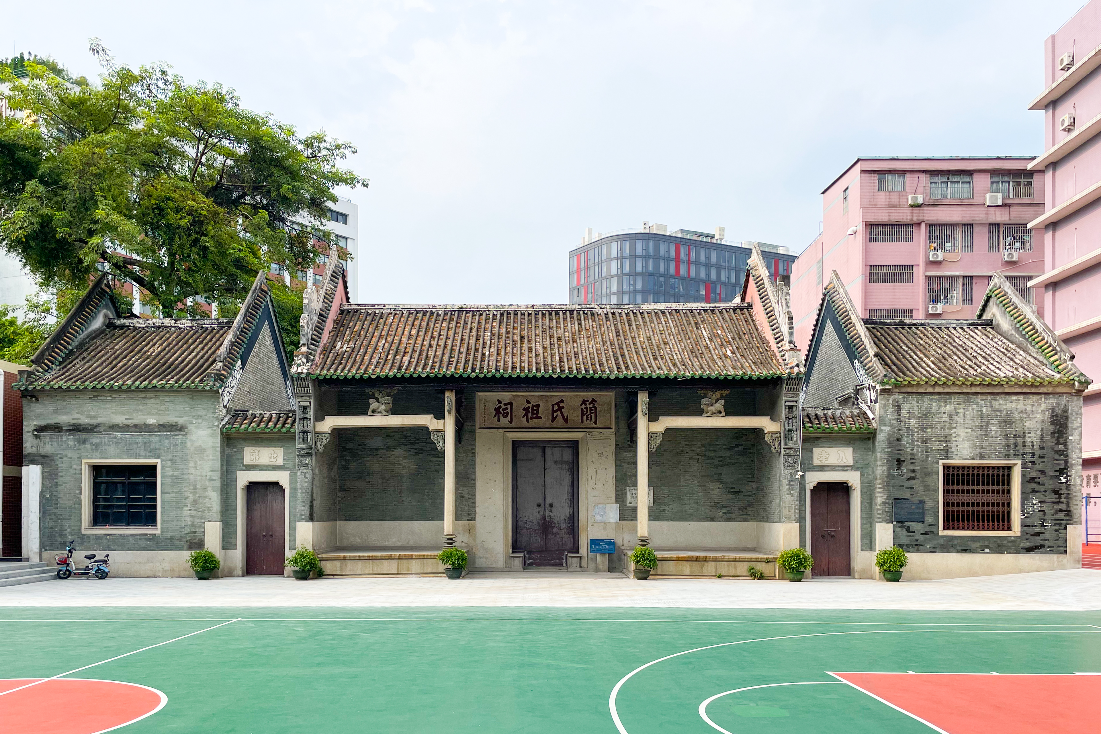 中文（香港）: 位於廣州市越秀區盤福路98號越秀外國語學校内的簡氏祖祠